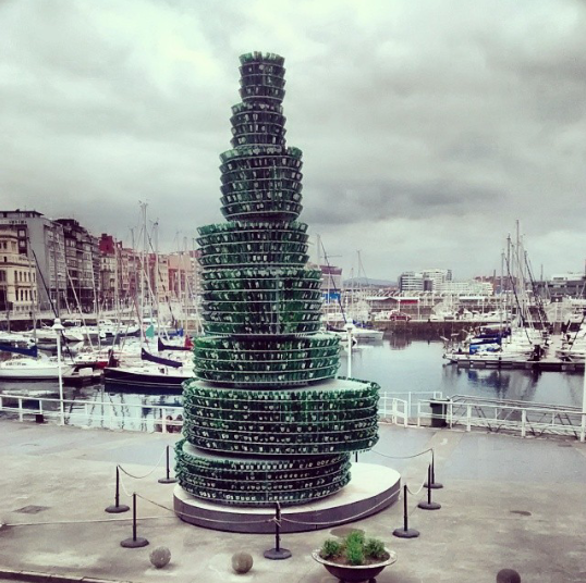 Árbol hecho con botellas de sidra recicladas situado en el puerto deportivo de Gijón, Asturias y vista del puerto.